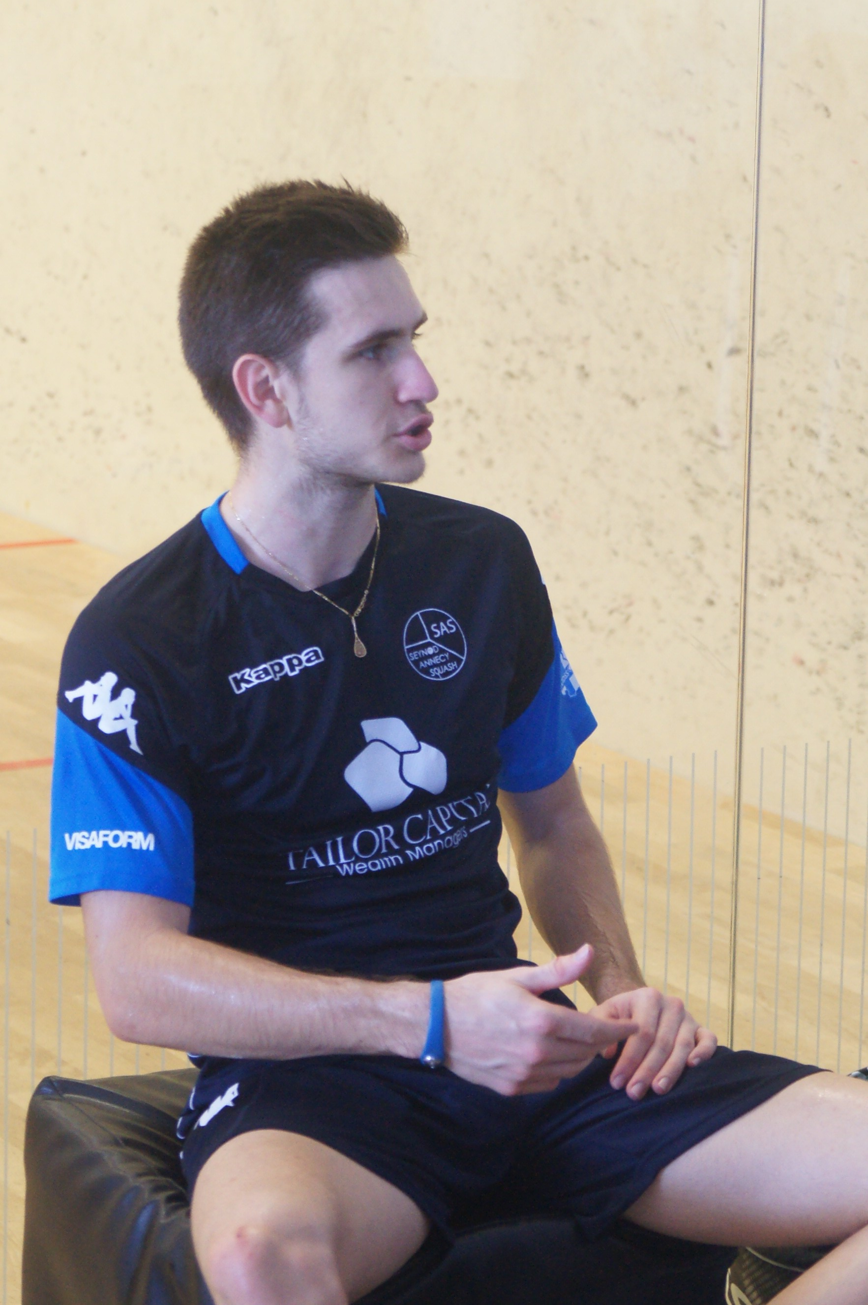 Benjamin Aubert, Antibes 2018